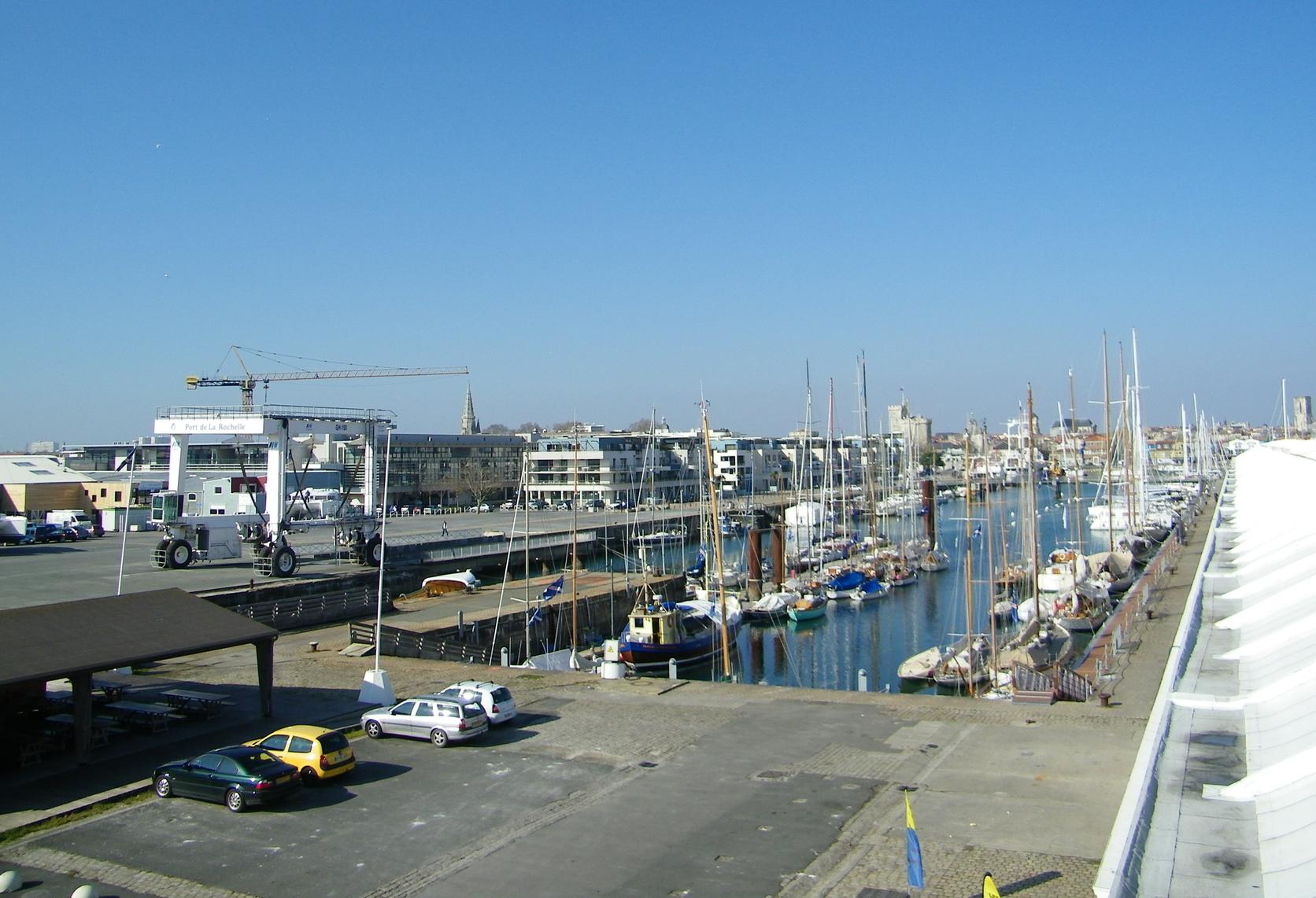 Le Bassin des chalutiers à La Rochelle vu depuis le bâtiment de l'Encan